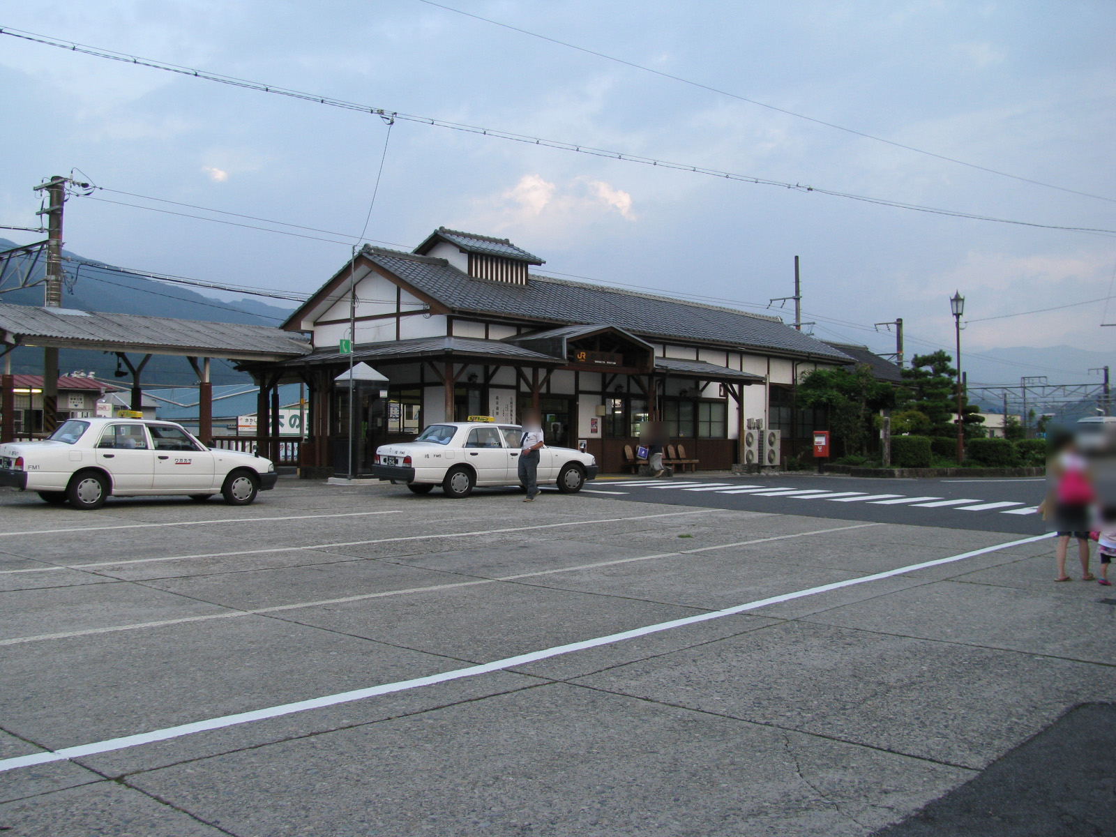 JR中央本線坂下駅